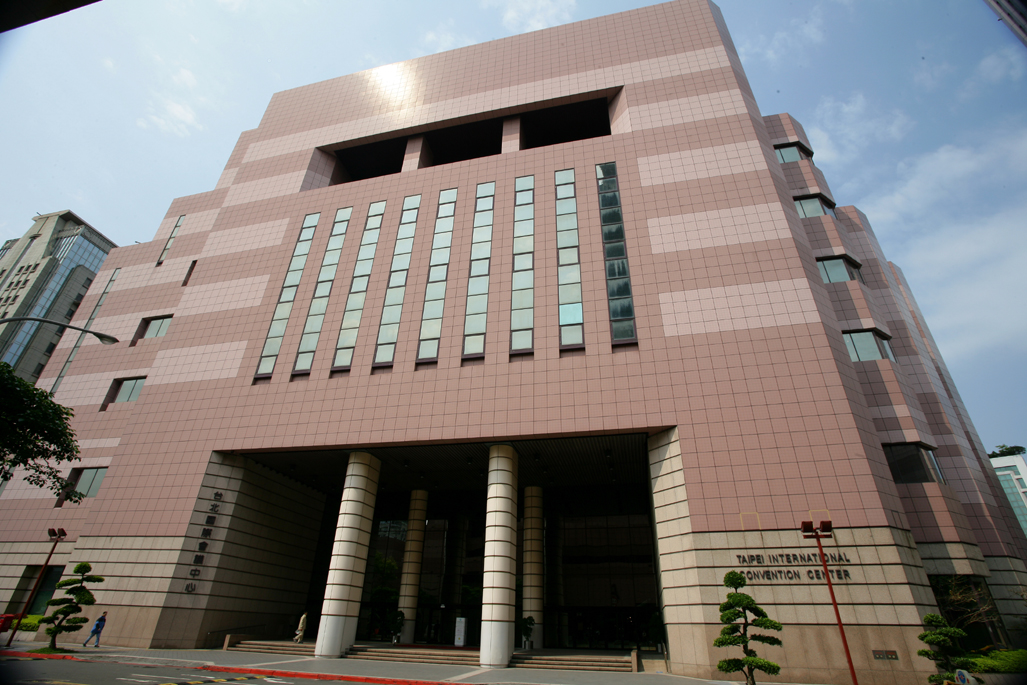 中文（台灣）: 台北國際會議中心東側大門